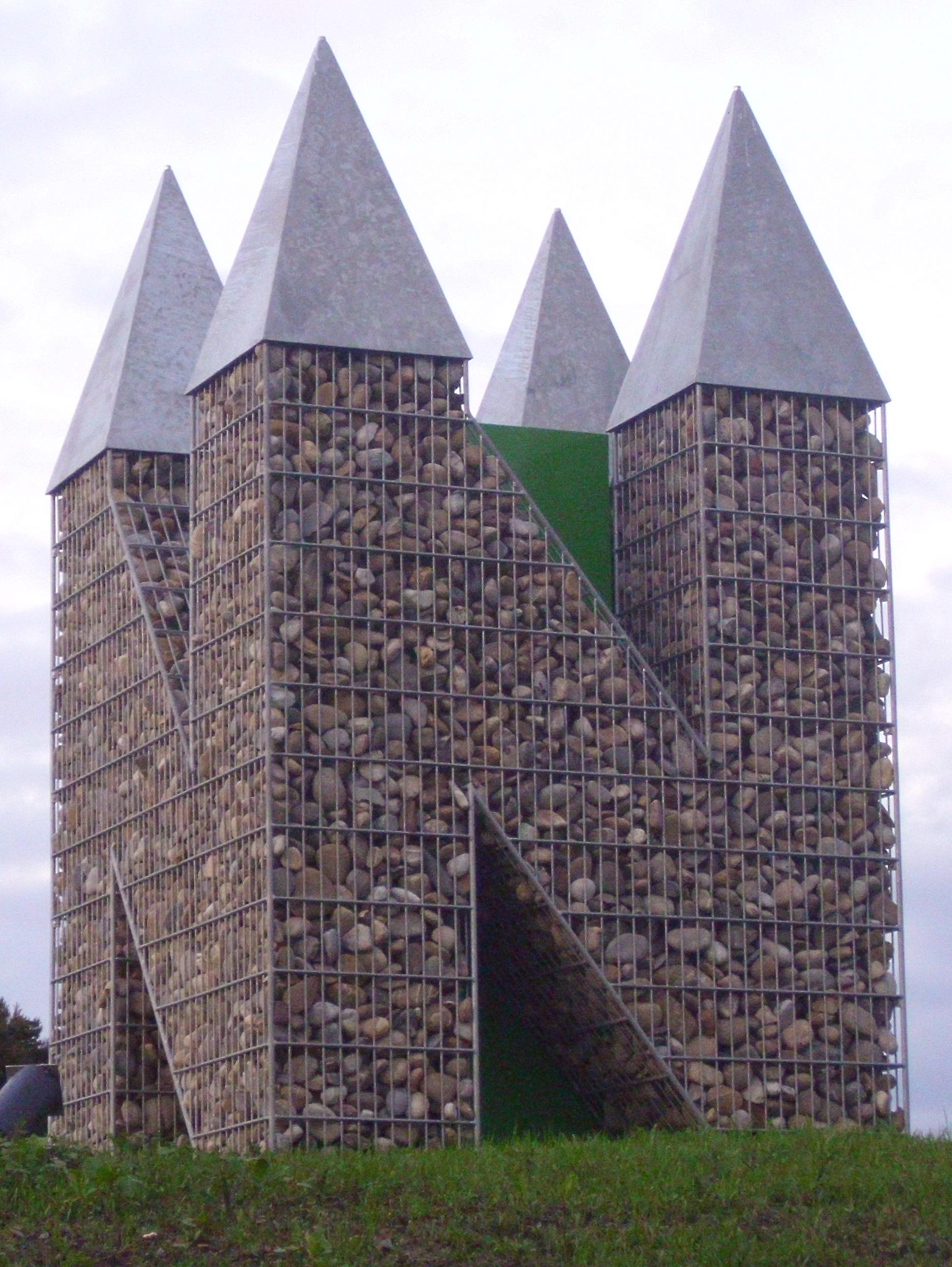 Vierseitiges N mit Spitzen auf dem Kreisverkehr in Neuenkirchen (Kreis Steinfurt) an der Kreuzung B70, B499 und Burgsteinfurter Damm